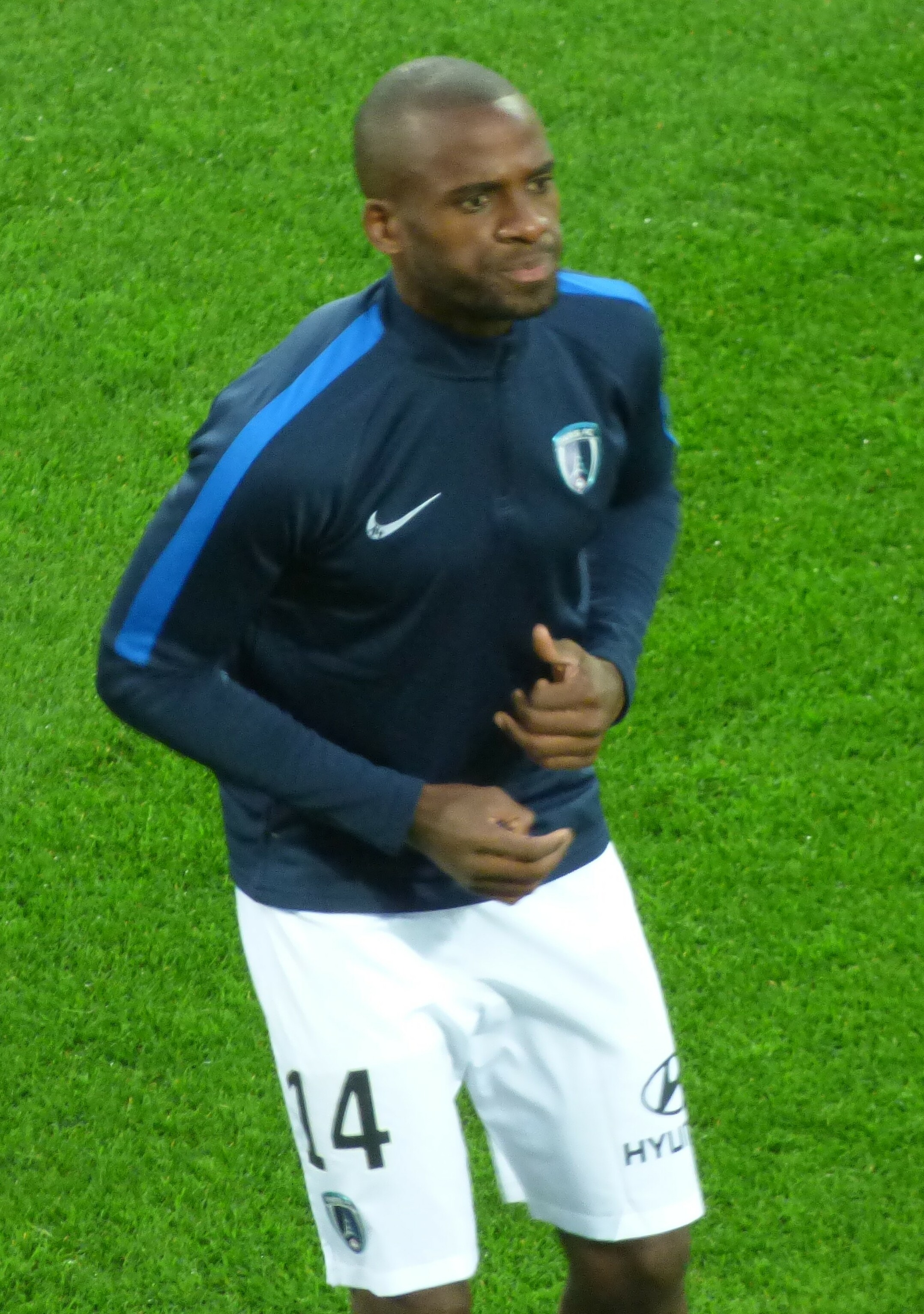 Cyril Mandouki avant le match Lens / Paris, comptant pour la neuvième journée du championnat de France de football de Ligue 2, le 28 septembre 2018.